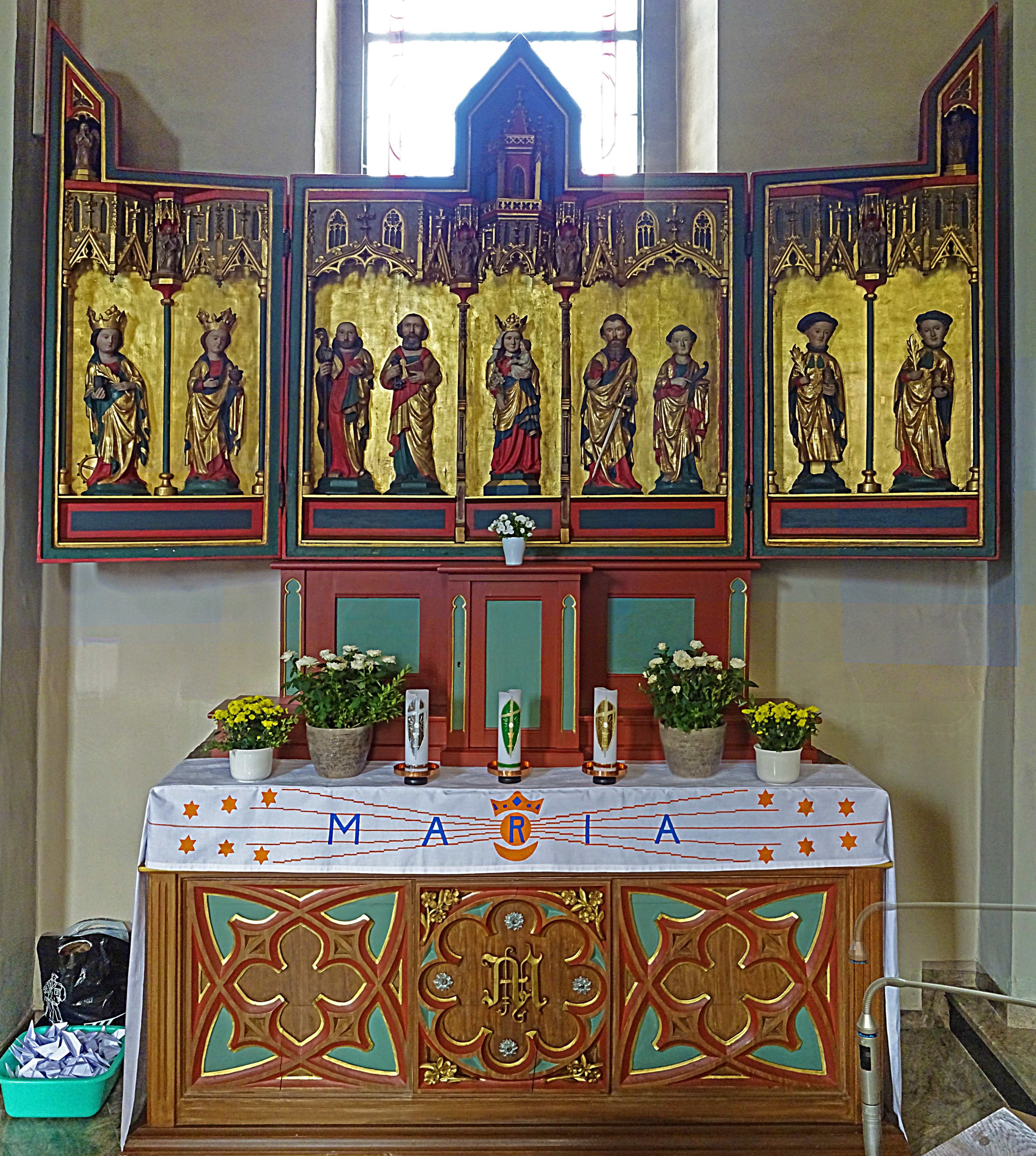 gotischer Nebenaltar in der Nikolauskirche (Neuendorf), vermutlich 1380 ... 1420 erschaffen und aus dem Kloster Beuren erstanden